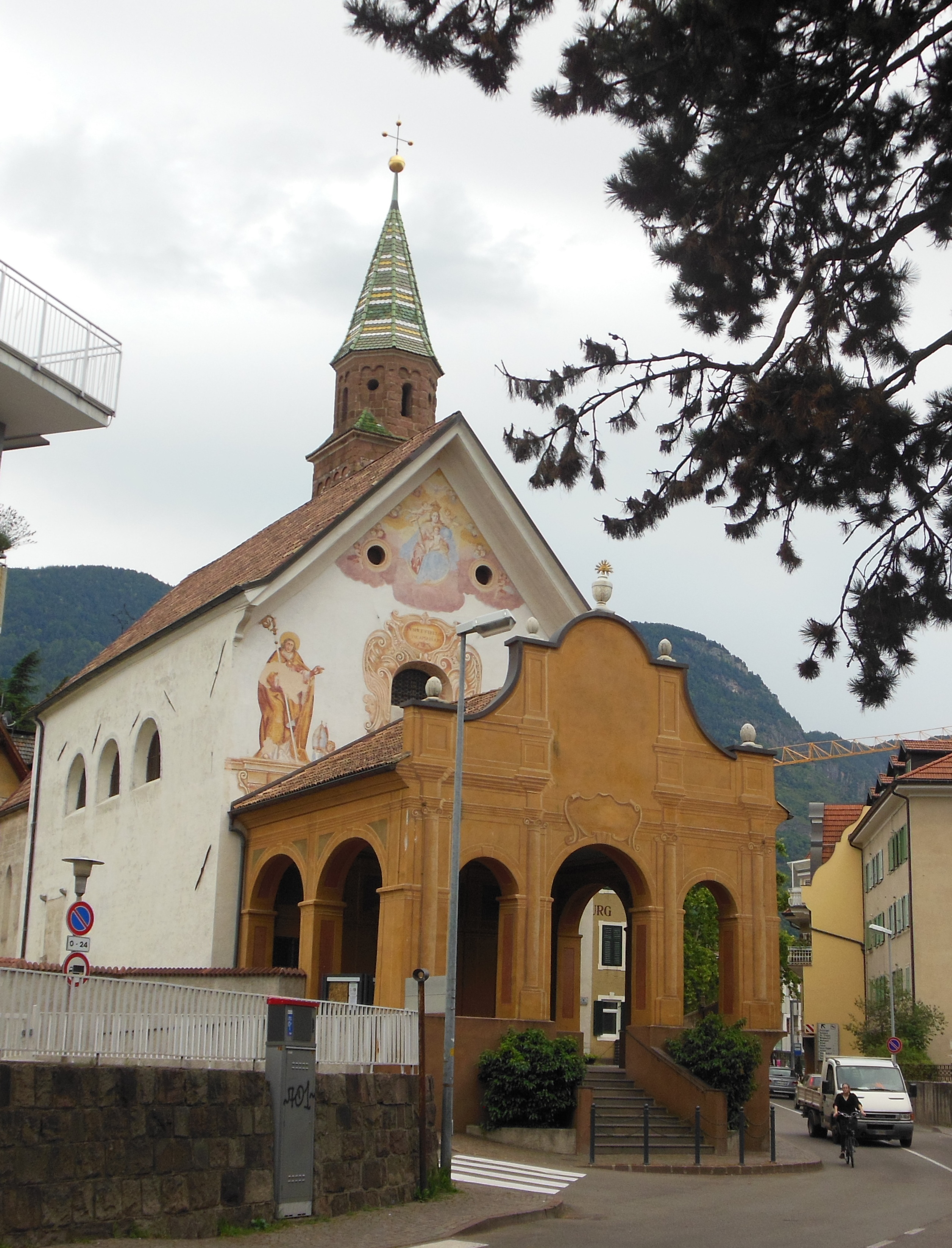 Die Kirche Maria Trost in Untermais von Westen